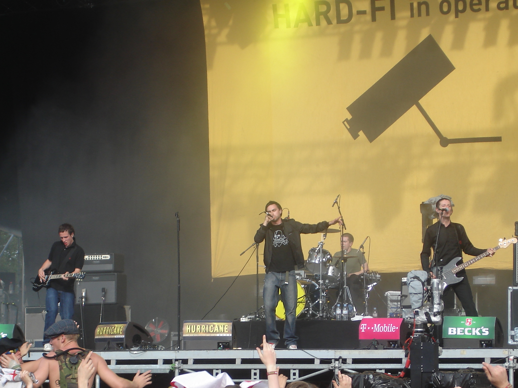 Hard-Fi beim Hurricane-Festival 2006 auf der Greenstage